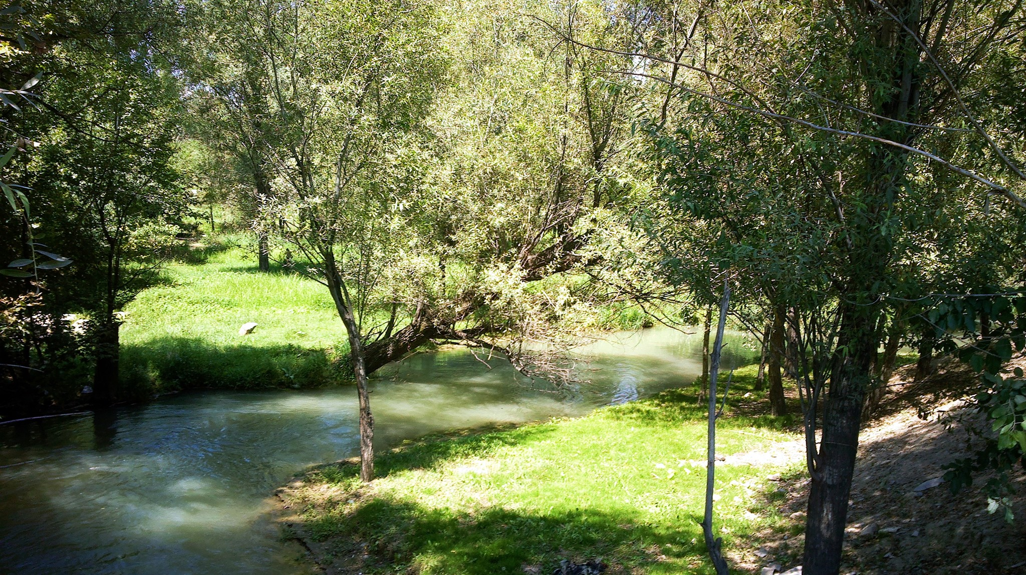 Oʻzbekcha/ўзбекча: Amir.Temur